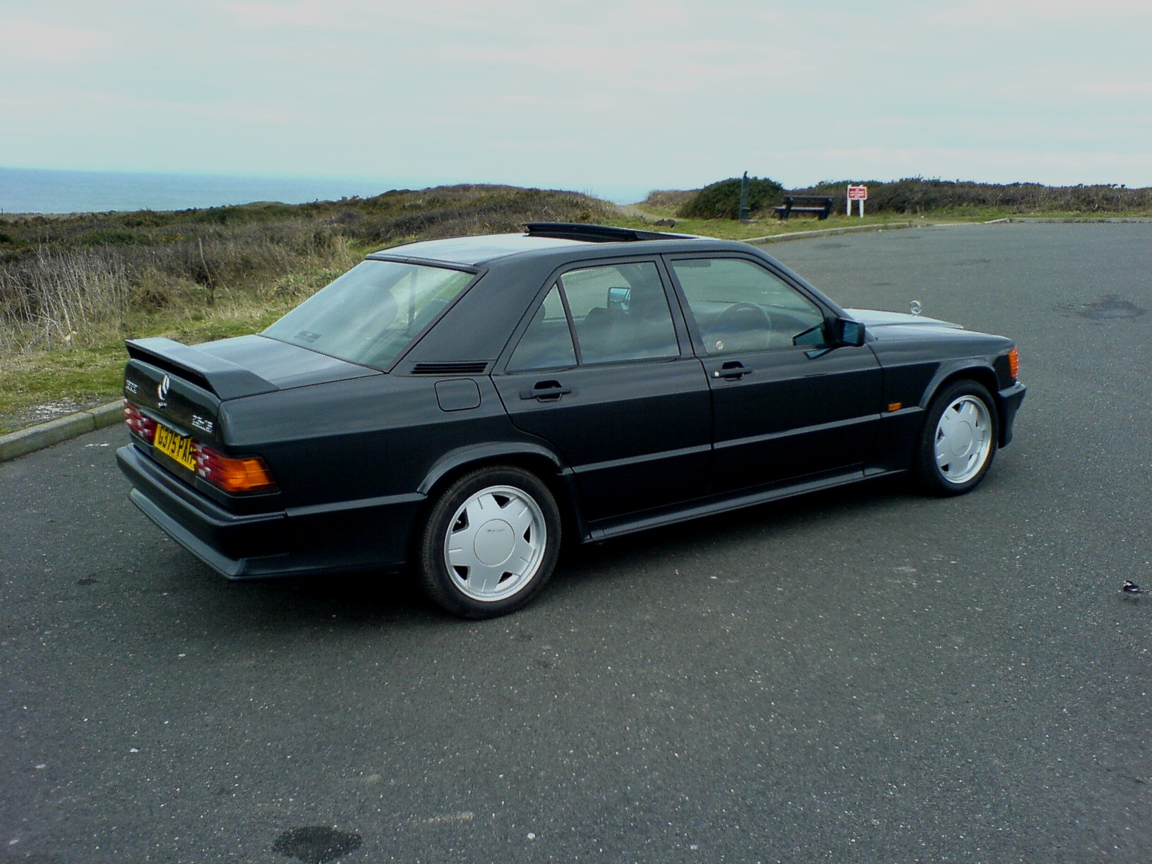 Mercedes-Benz 190e 2.5 16v Taken by Bigger Ben.